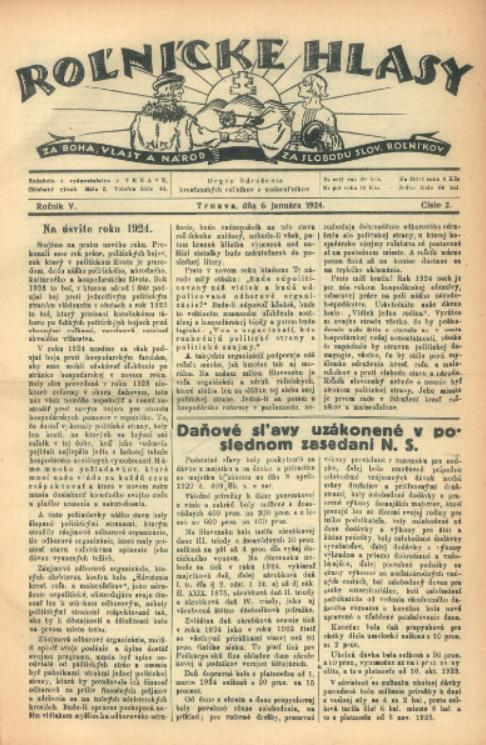 Titulný list týždenníka Roľnícke hlasy z r. 1924.